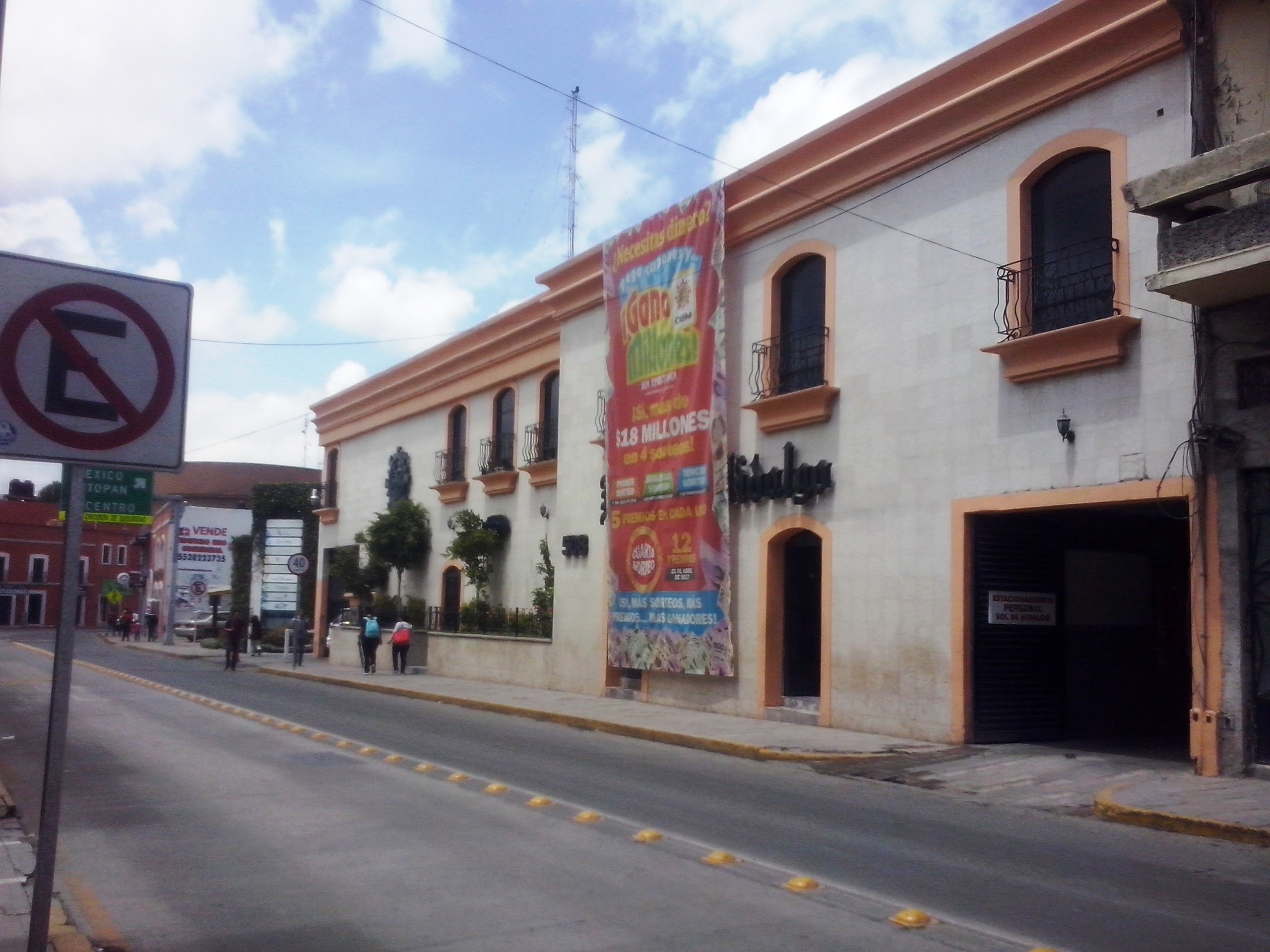 Sede de el Sol de Hidalgo en Pachuca